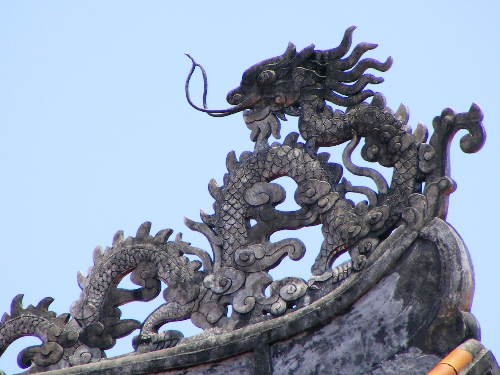 Roof detail, imperial enclosure, Hue